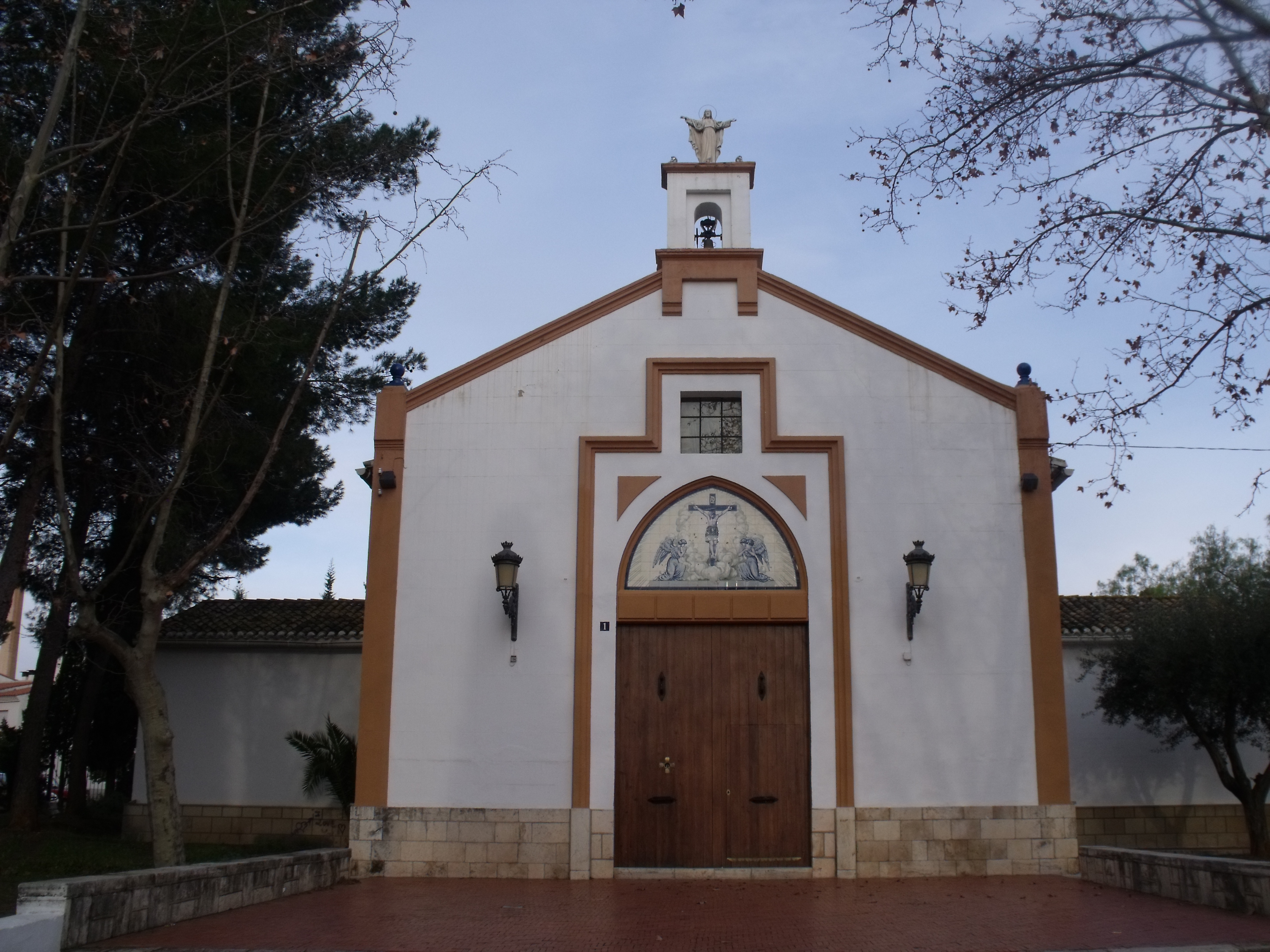 Imágenes del exterior de la ermita